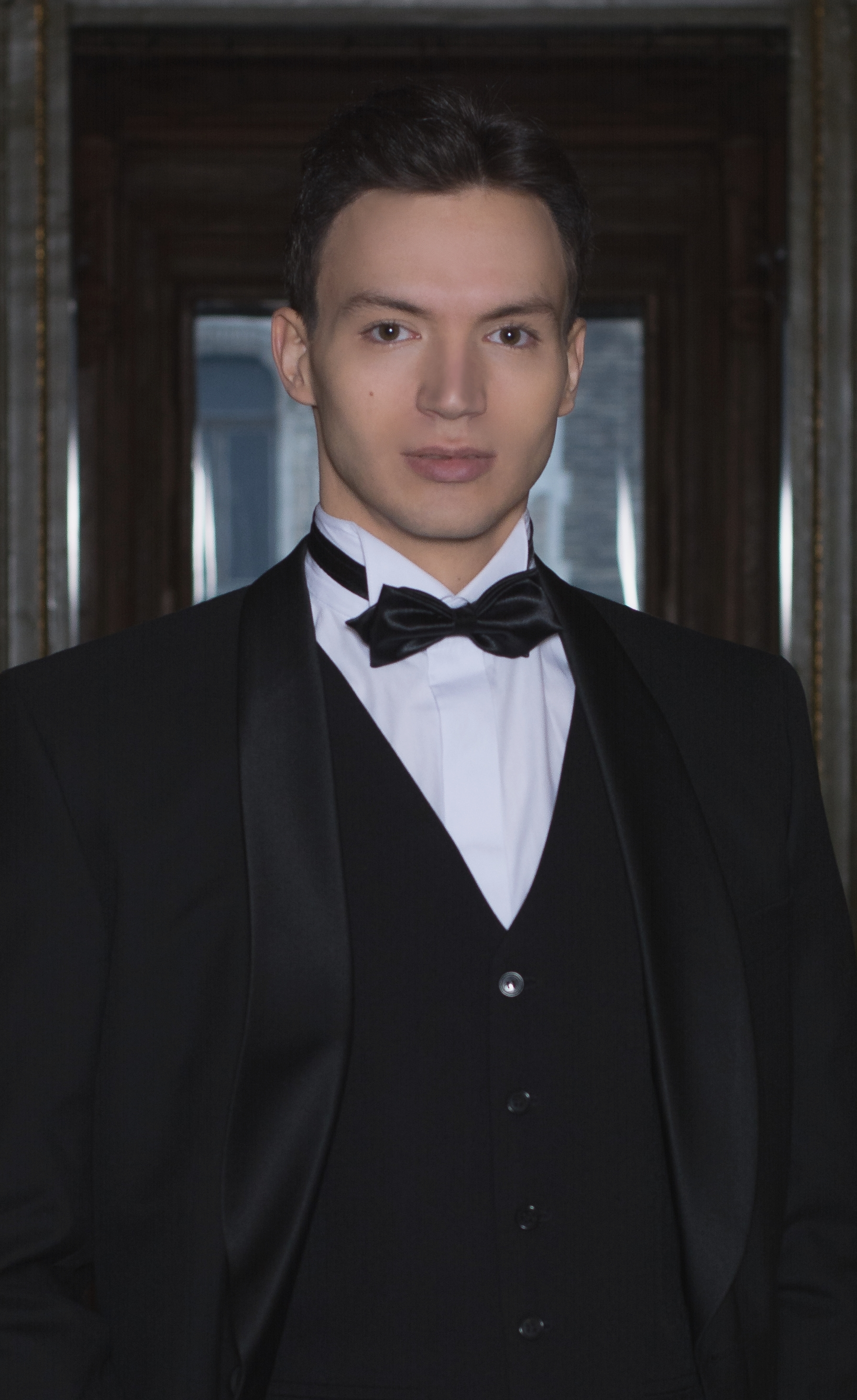 Hoffmann Richard - Magyar Állami Operaház